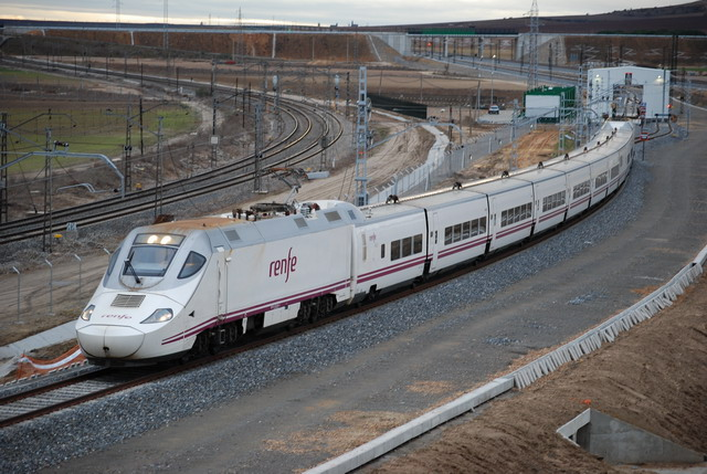 El 130-07 abandona el cambiador de Valdestillas para incorporarse a la línea convencional realizando el Alvia Madrid - Hendaya.